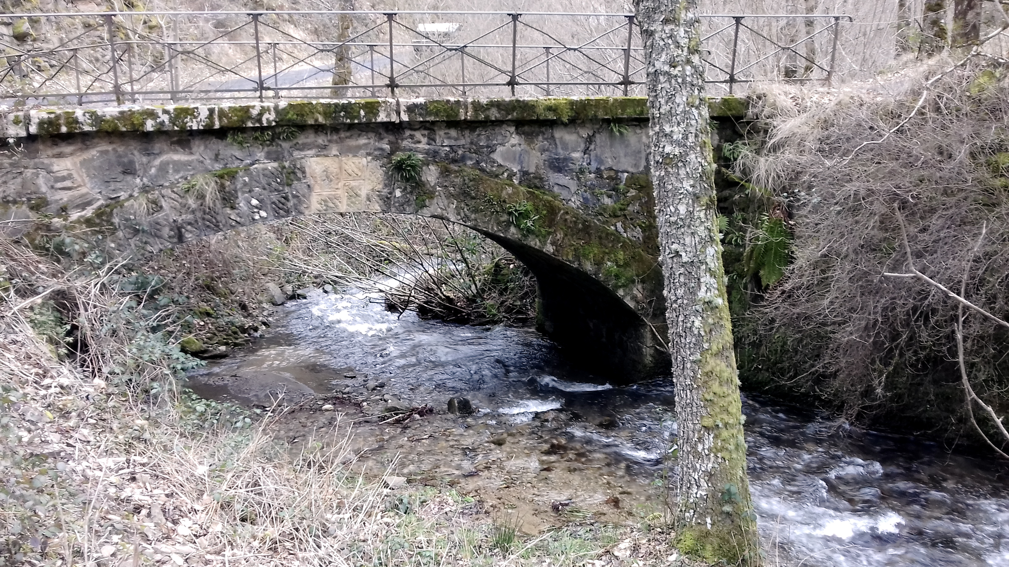 Le pont des Gandalgues qui traverse le ruisseau du Bonance. Pomayrols, Aveyron, France